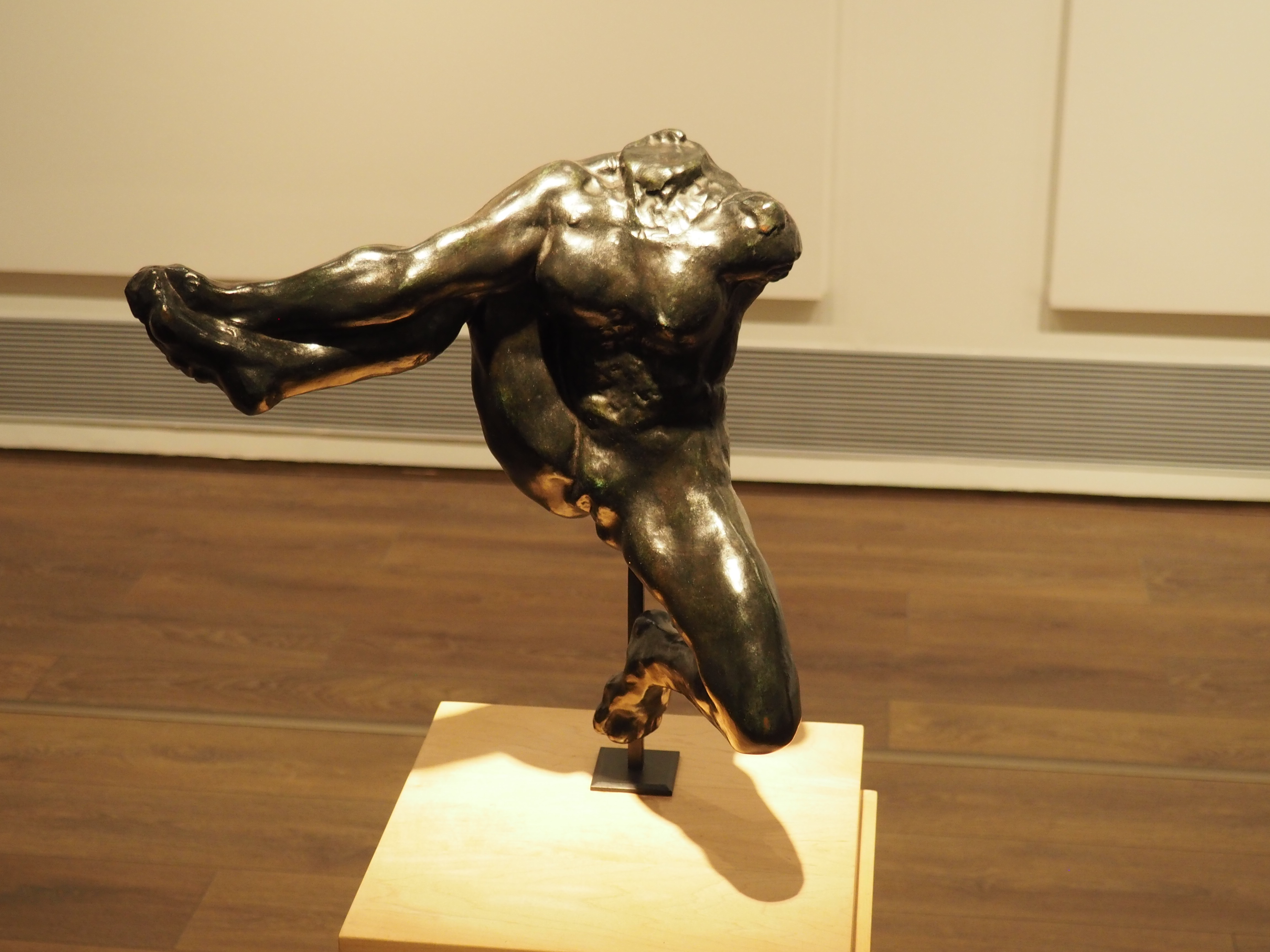 sculpture by rodin